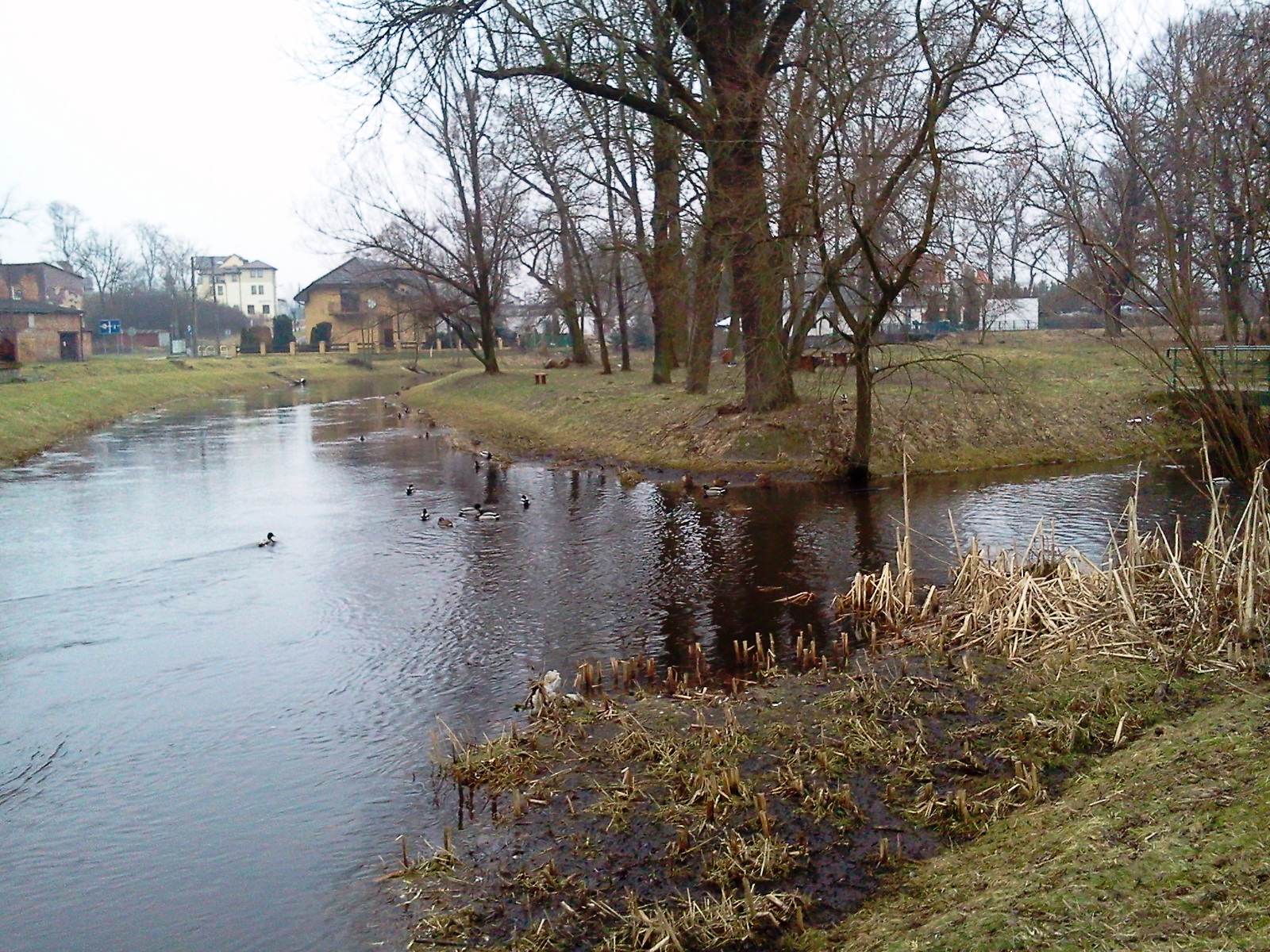 Rega z dopływem